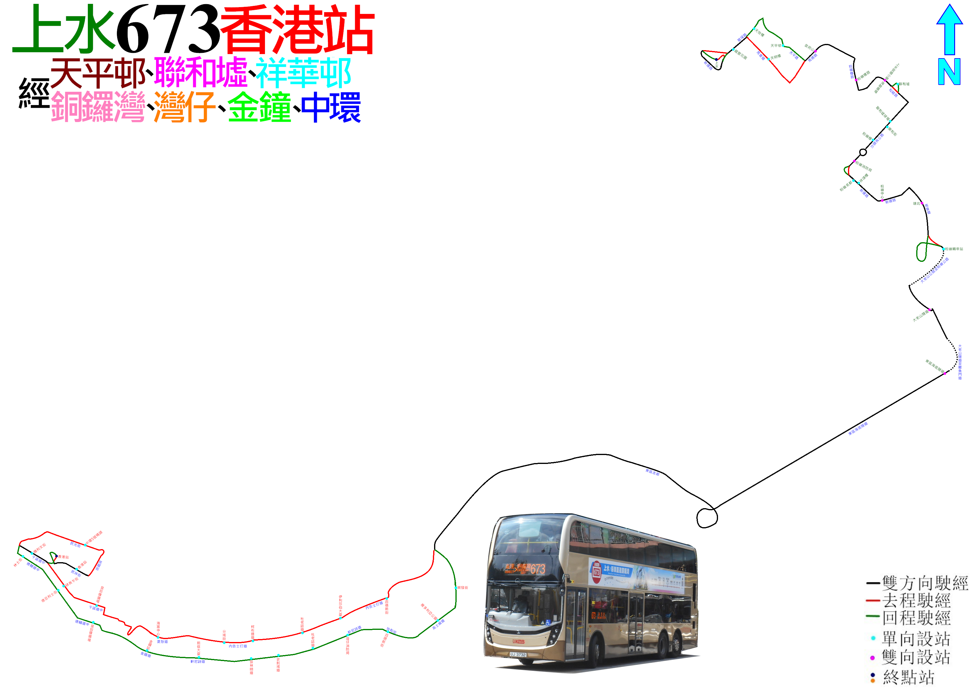 中文（香港）: 過海巴士673線的走線圖